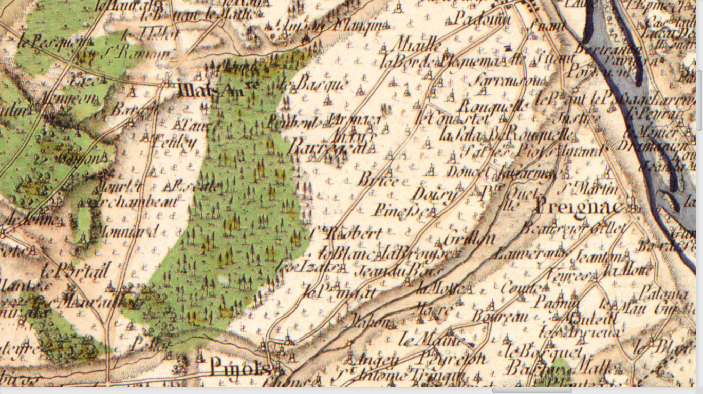 Carte de Cassini n°105 (Gironde, zoom sur Preignac), 1756.